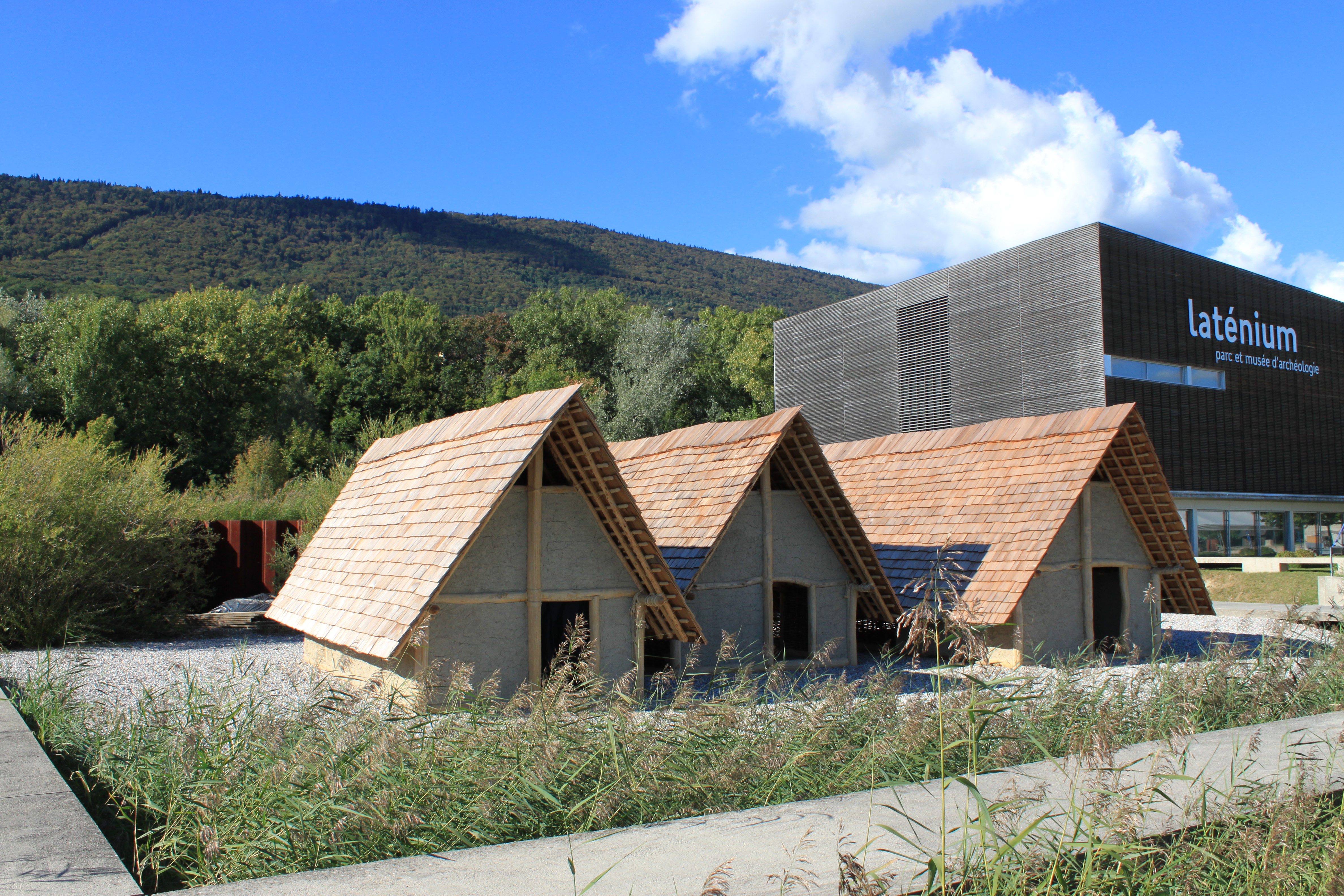 Bâtiment du Laténium (musée cantonal d'archéologie)